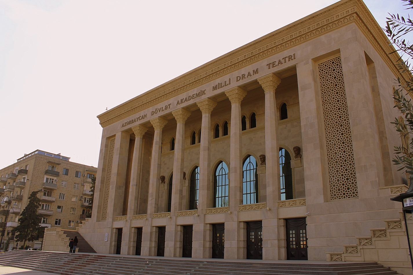 Азербайджанский драматический театр.